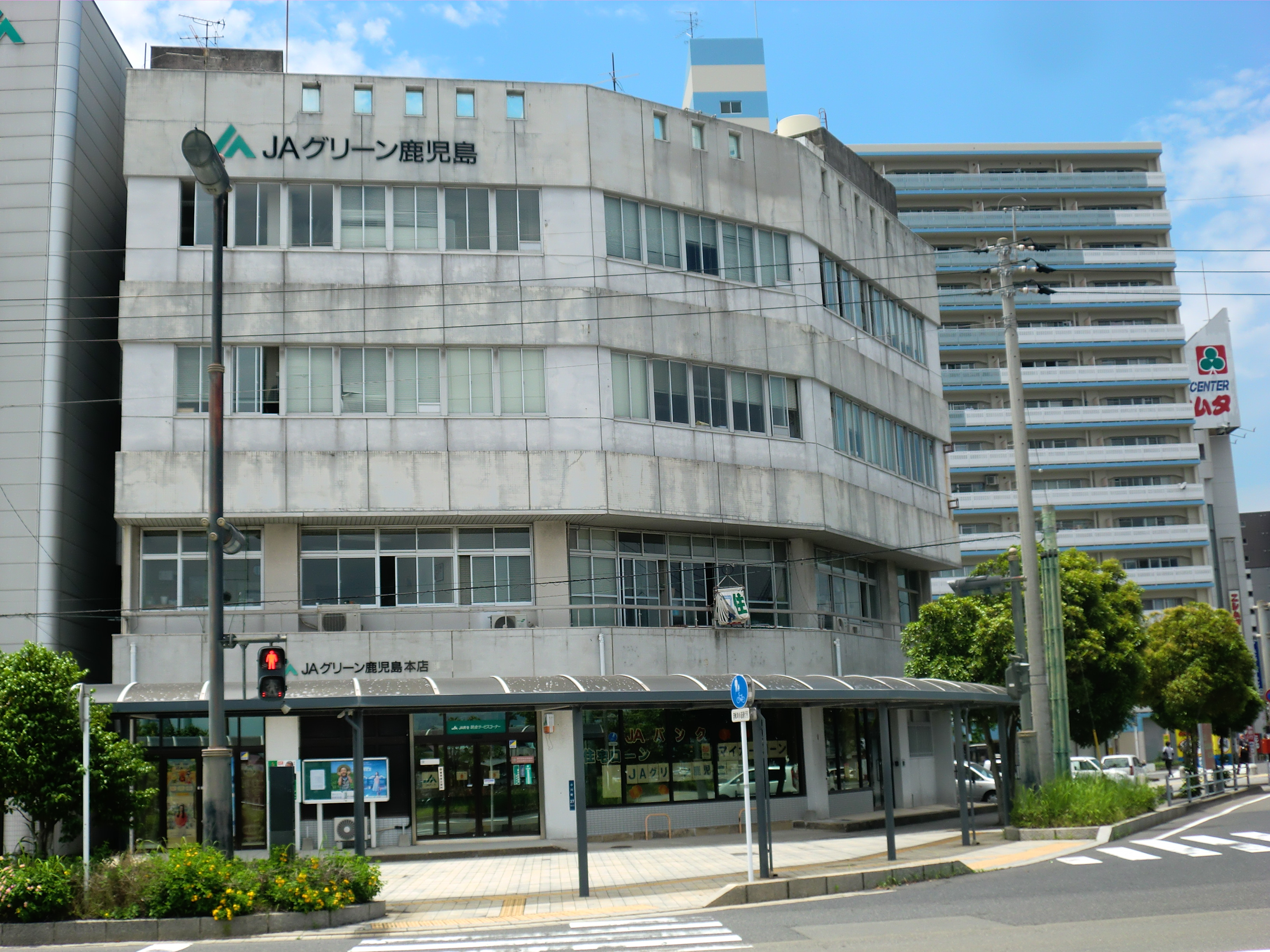 鹿児島市にあるJAグリーン鹿児島本店